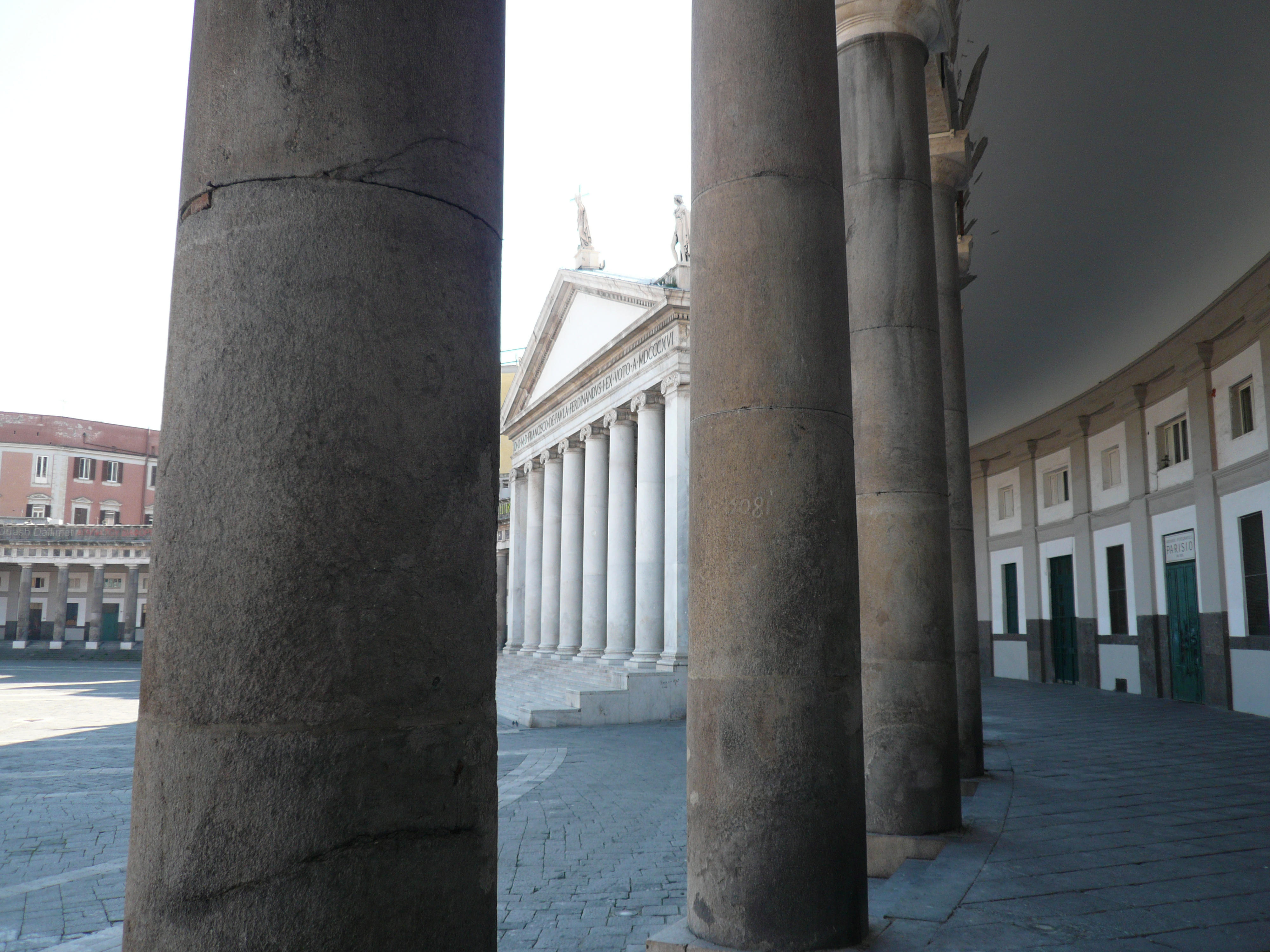 Basilica di San Francesco di Paola in piazza del Plebiscito a Napoli